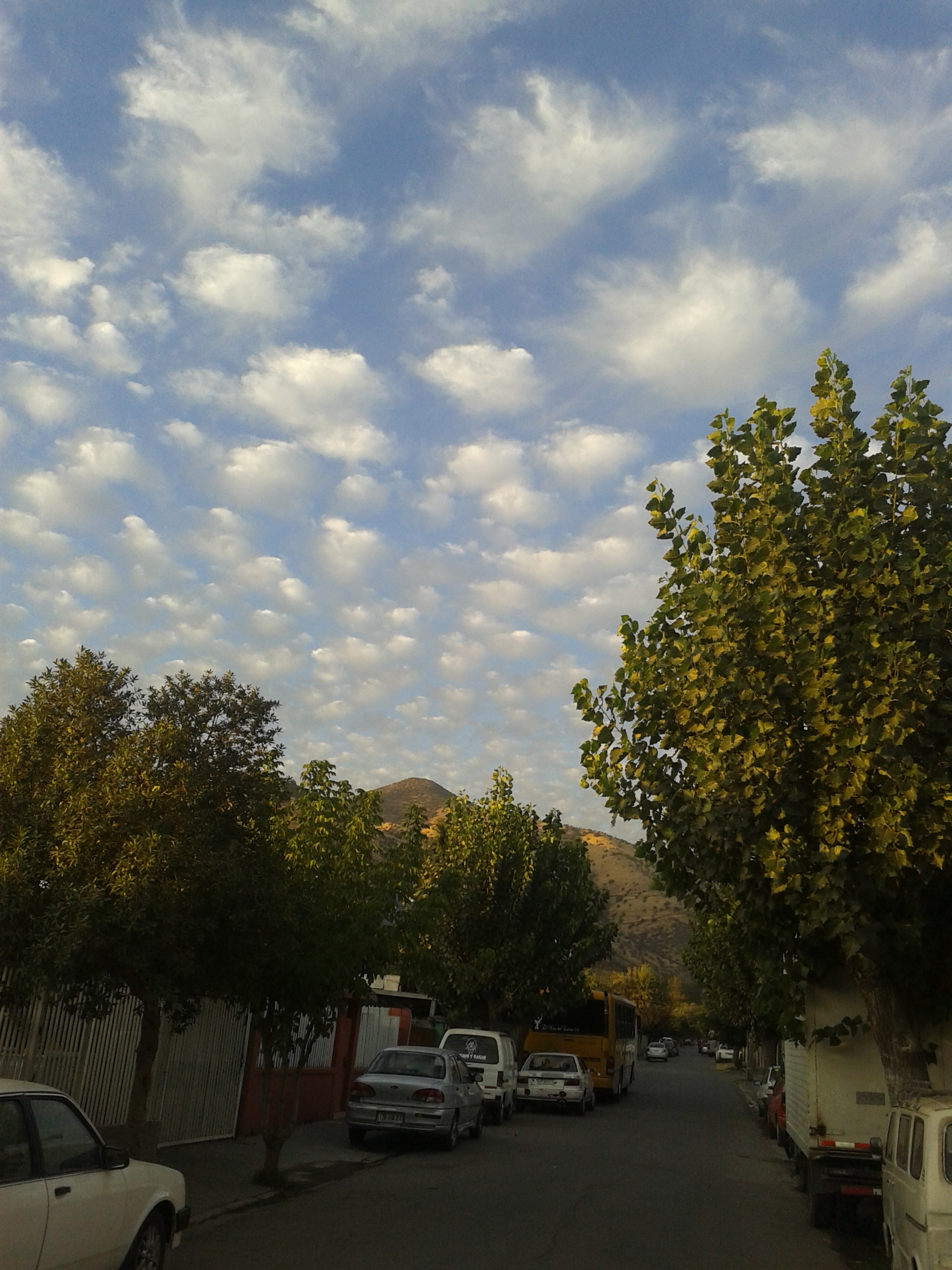 Poblaciónde huechuraba